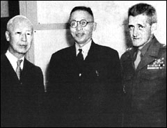 Syngman Rhee, Kim Gu, John Hadge